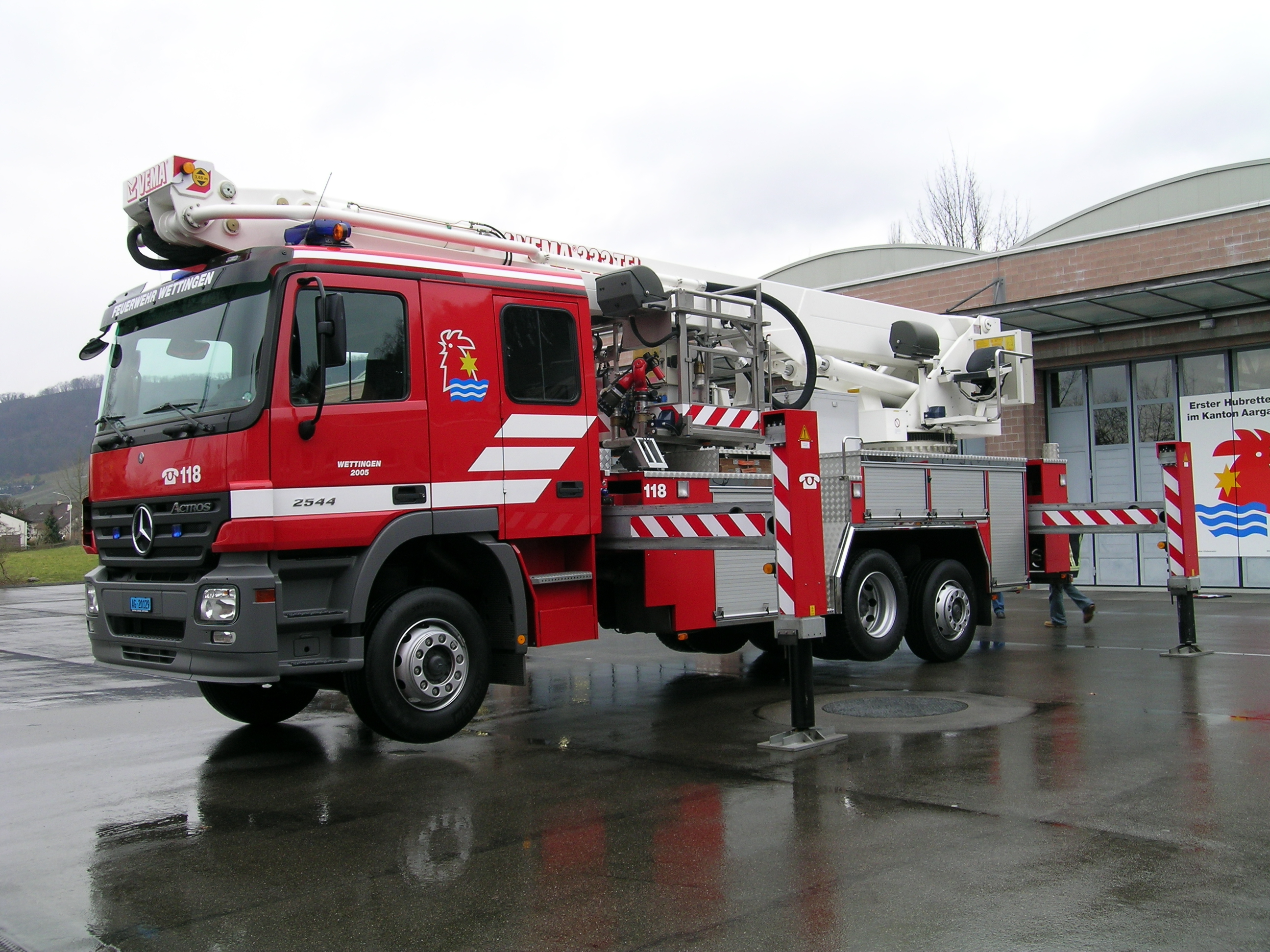 Hubretter